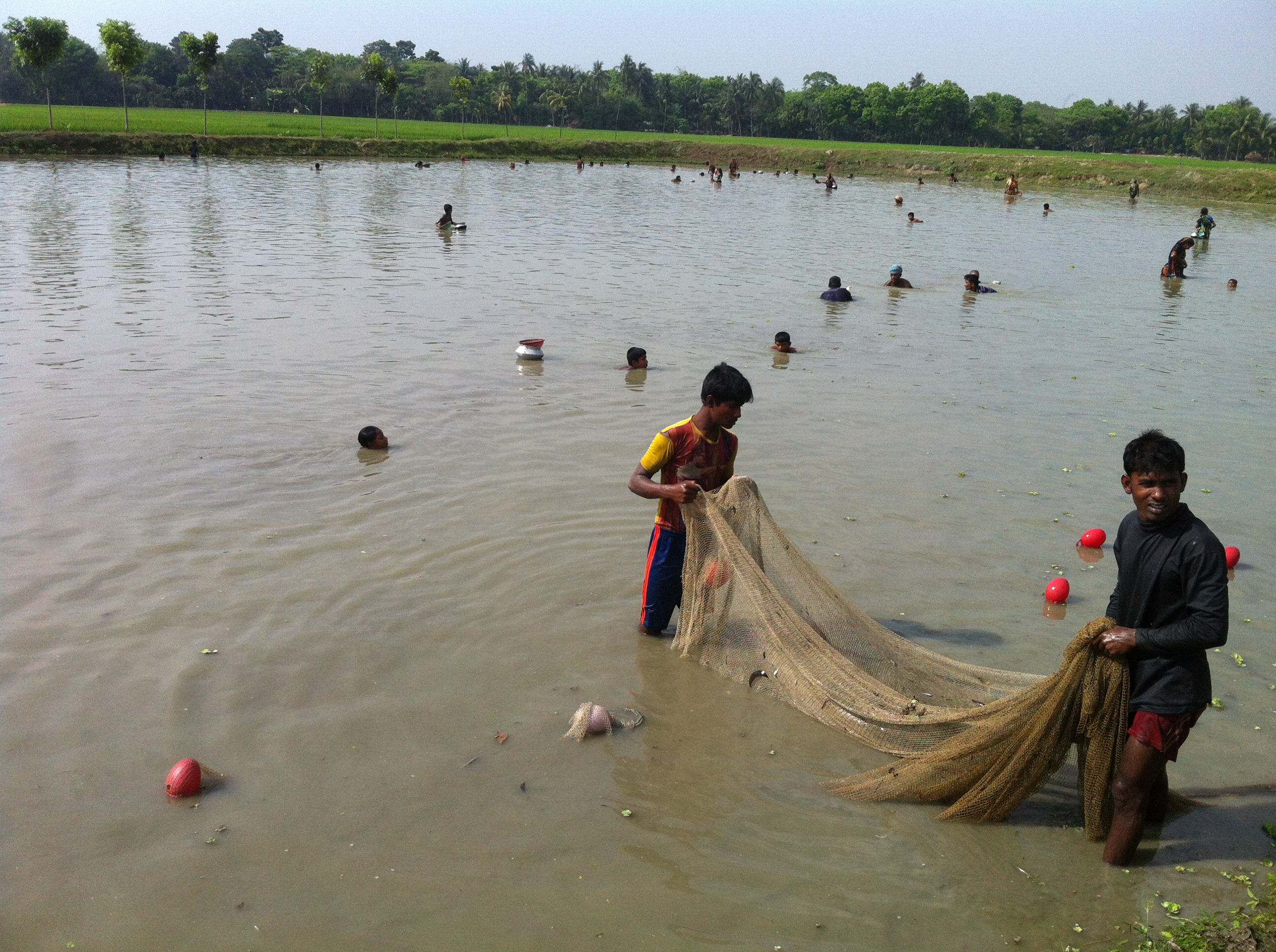 মাছ ধরছে মৎস চাষি